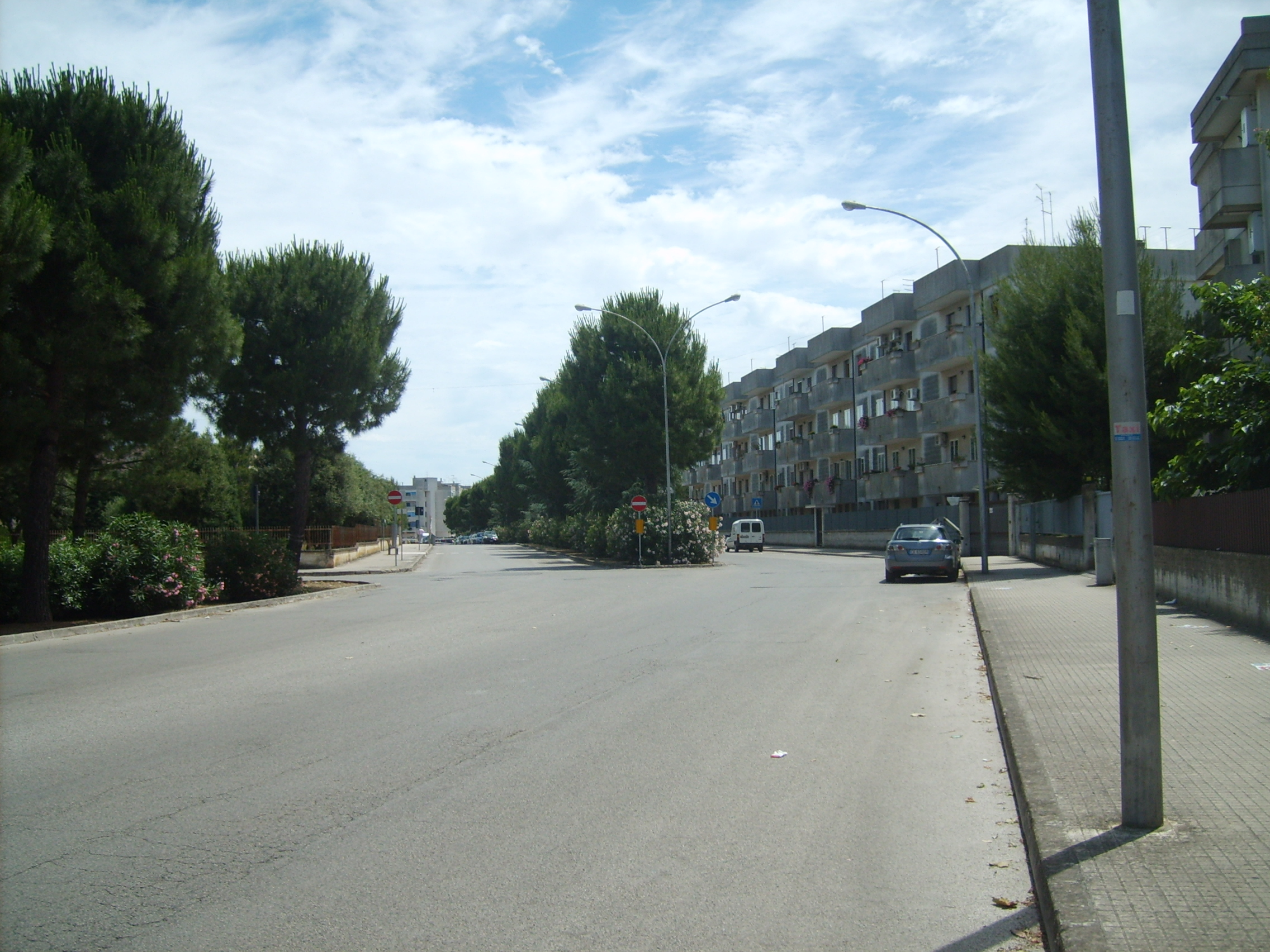 Viale Giuseppe Abbadessa, Francavilla Fontana